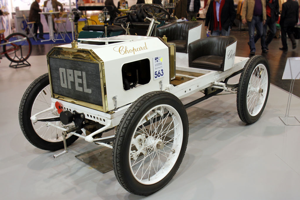 1903 Opel Rennwagen_IMG_3123